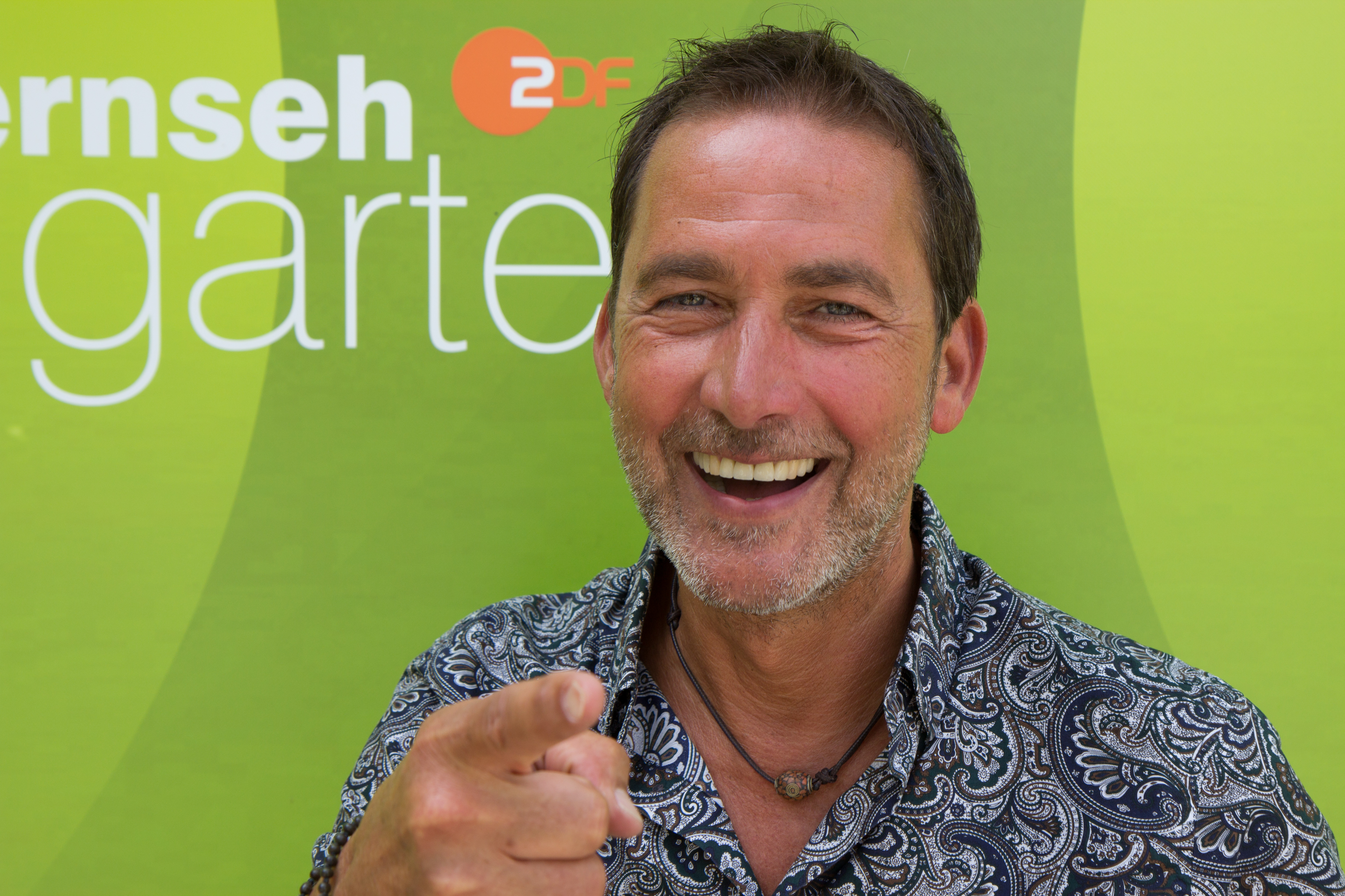 Markus Schöffl beim ZDF-Fernsehgarten am 20. Mai 2018 in Mainz.